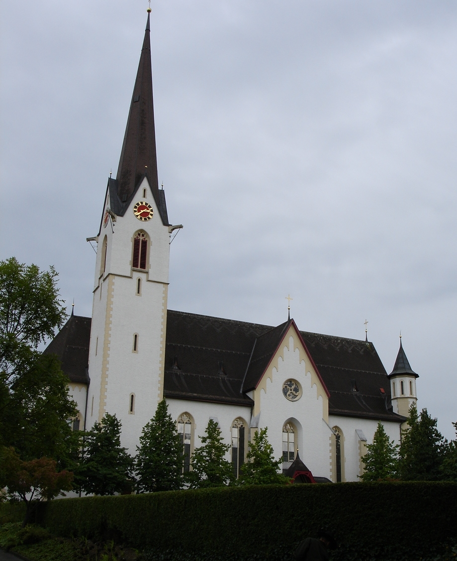 Kath. Pfarrkirche St. Josef in Abtwil, Kanton St. Gallen, Schweiz